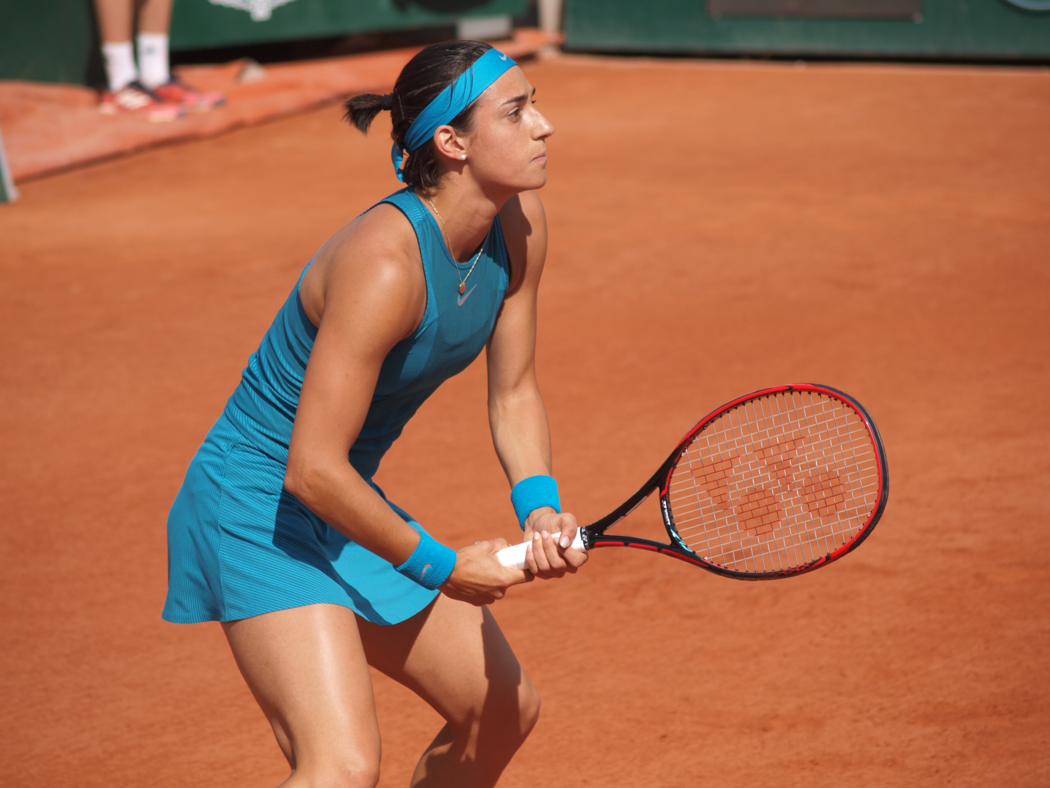 Caroline Garcia, durant le match du 29 mai 2018, sur le court Lenglen (stade Roland Garros) en compétition contre Yingying Duan.